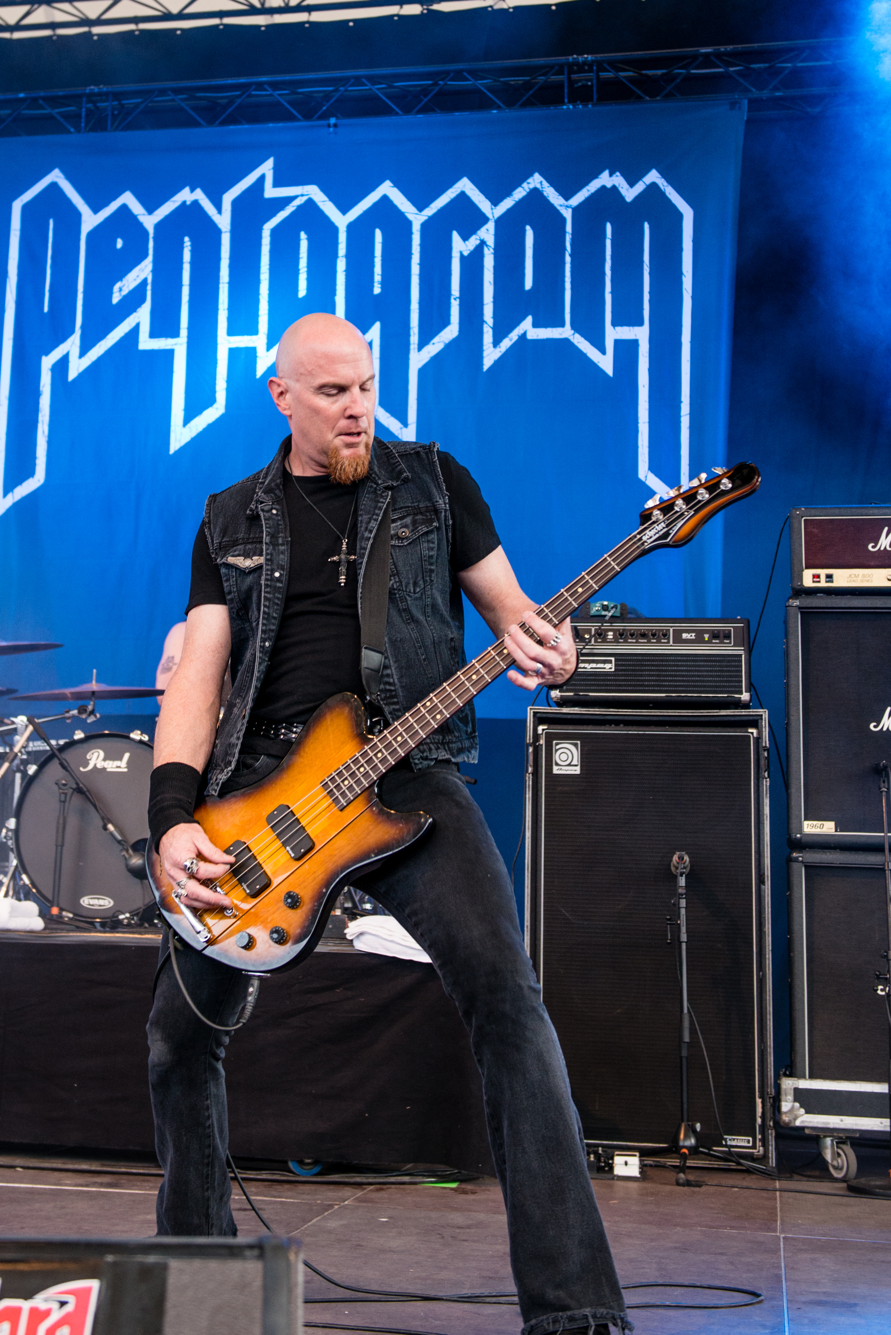 'Rock Hard Festival 2015; Gelsenkirchen Amphitheater': 'Pentagram'